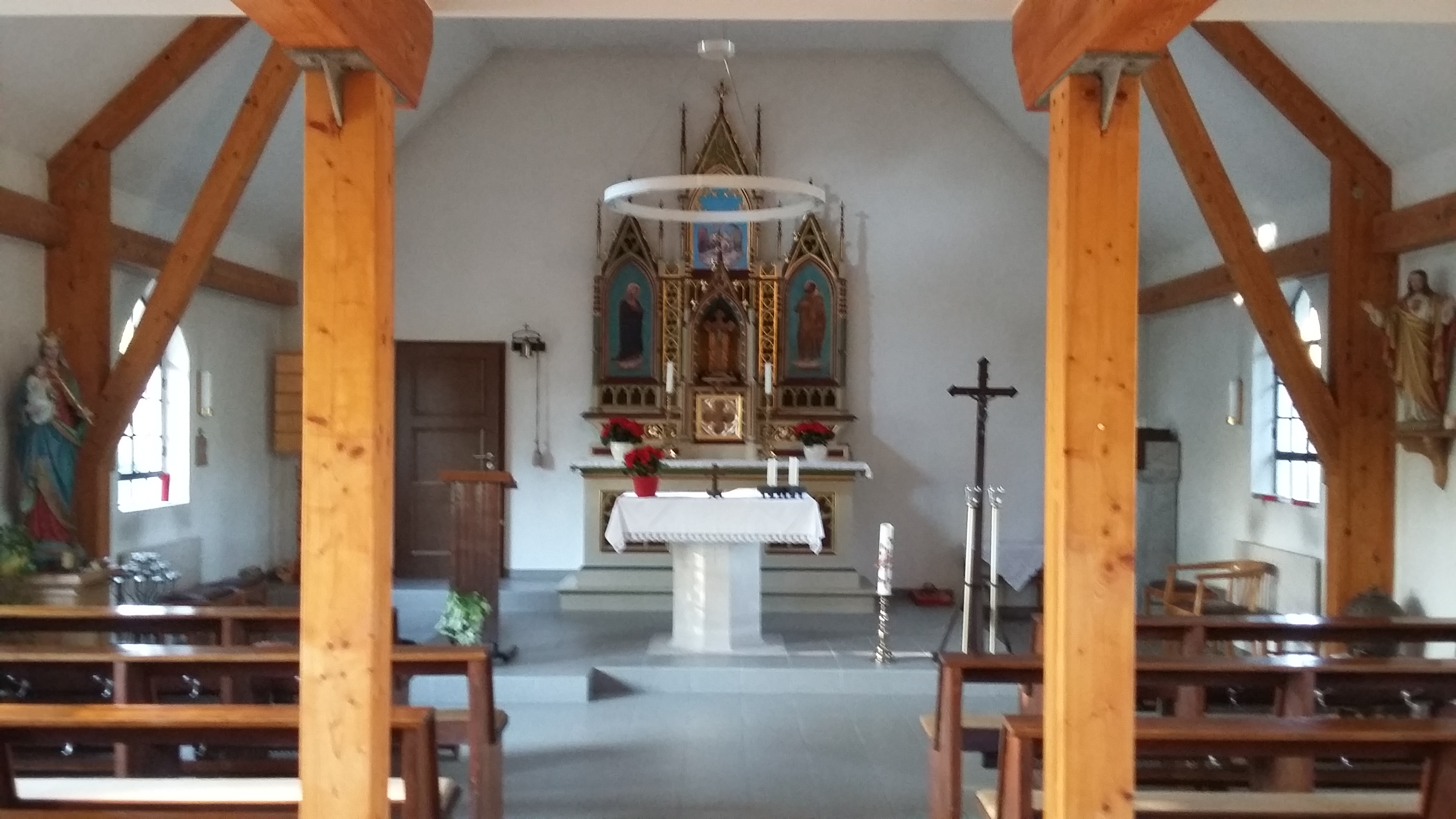 Kapelle Friedrichsthal - Innenansicht mit Hochaltar (2019)